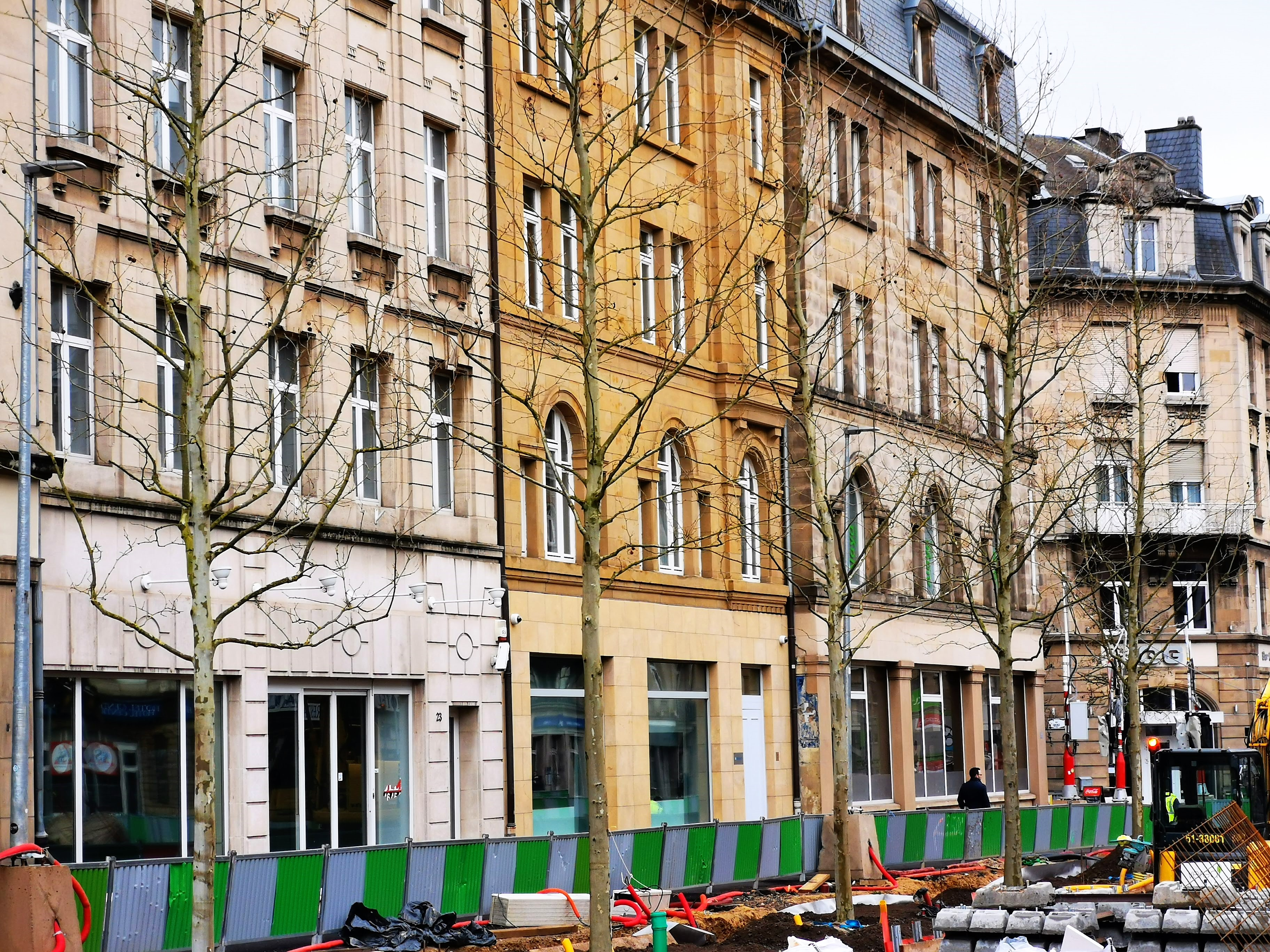 Luxembourg. Chantier tram dans l'avenue de la Liberté.